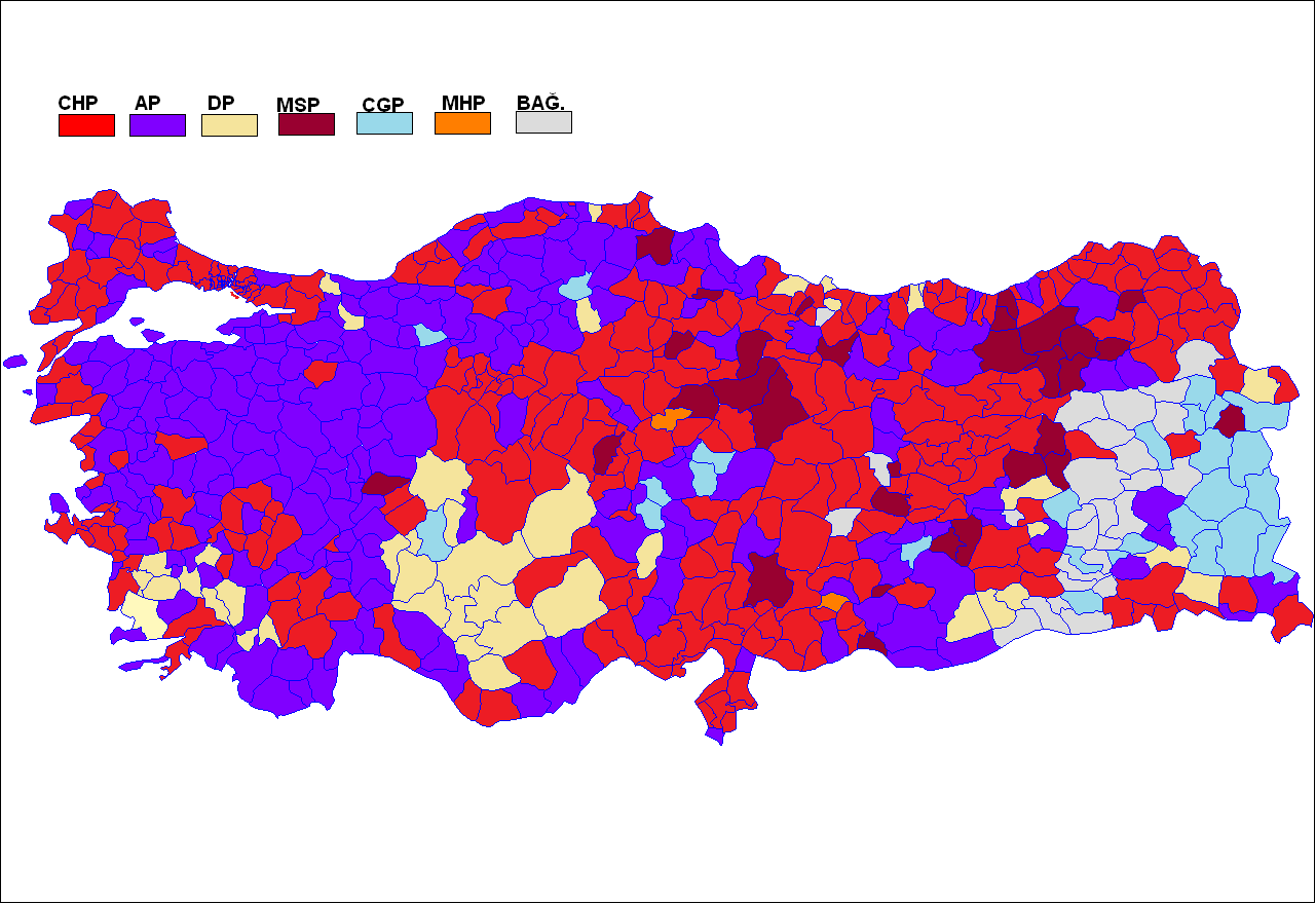 1973 genel seçimleri sonuçlarının Türkiye ilçeler haritasında gösterimi.